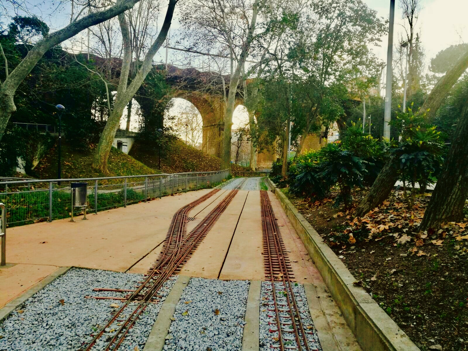 Parque de Vallparadís. Minitren y puente Jacuard